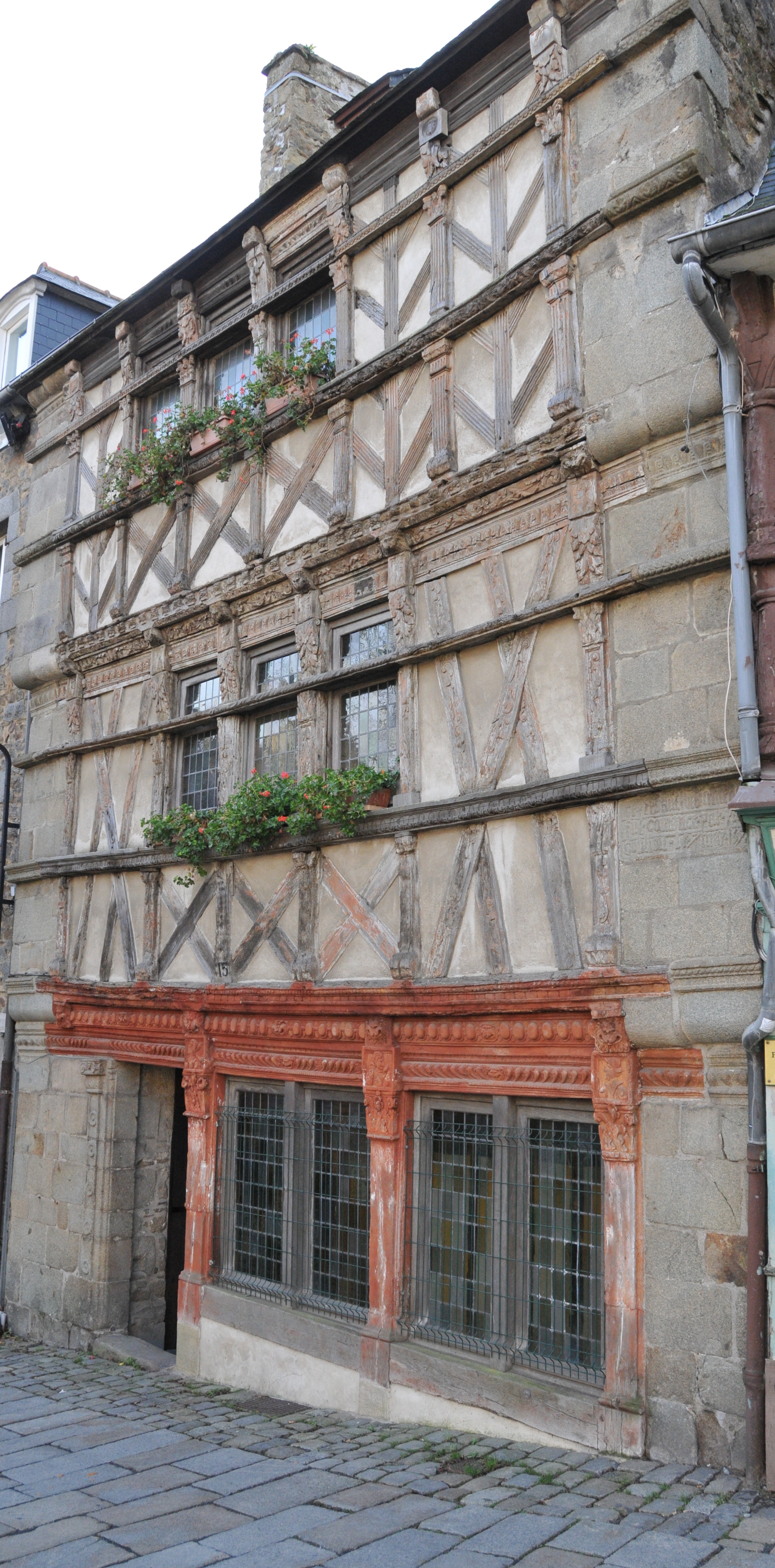 Une maison du vieux quartier de Saint-Brieuc, 34 rue Fardel, entre les halles et la préfecture.